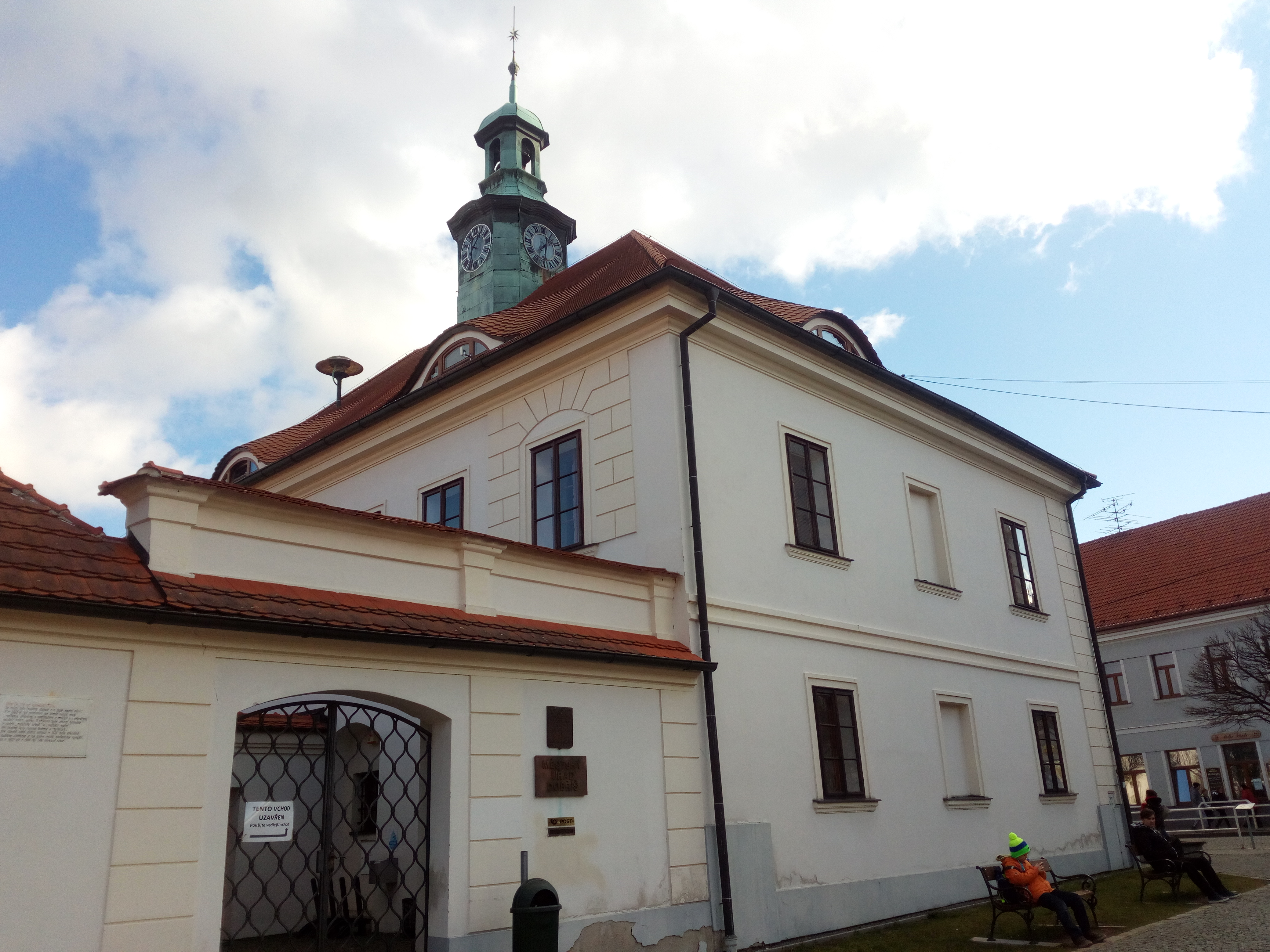 Snímek dobříšské radnice v pohledu od autobusového nádraží